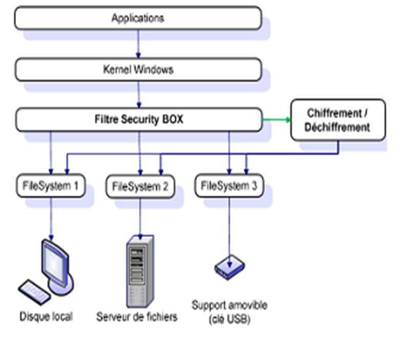 Fonctionnement